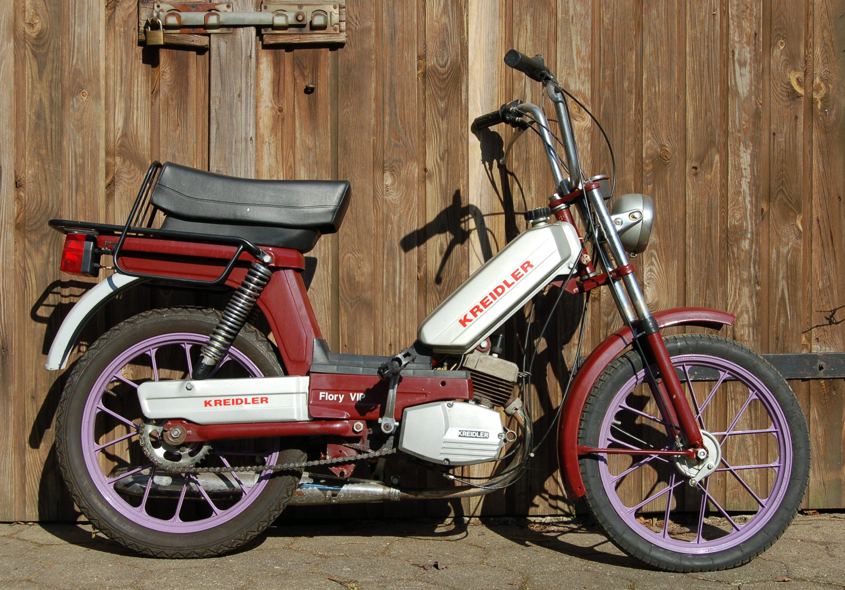 Kreidler Flory Vip Baujahr 1982, Hergestellt von der Firma Garelli nachdem Kreidler 1982 in Konkurs gegangen war, fertigte Garelli bis 1985 die Mofas Flory und Flirt unter dem Namen Kreidler